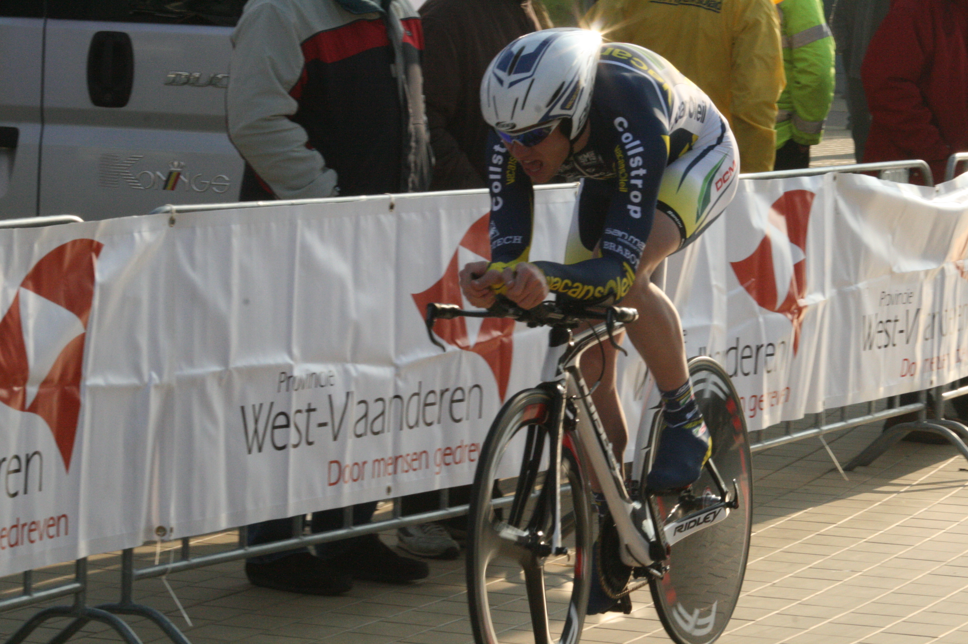 Driedaagse van West-Vlaanderen 2011, proloog in Middelkerke